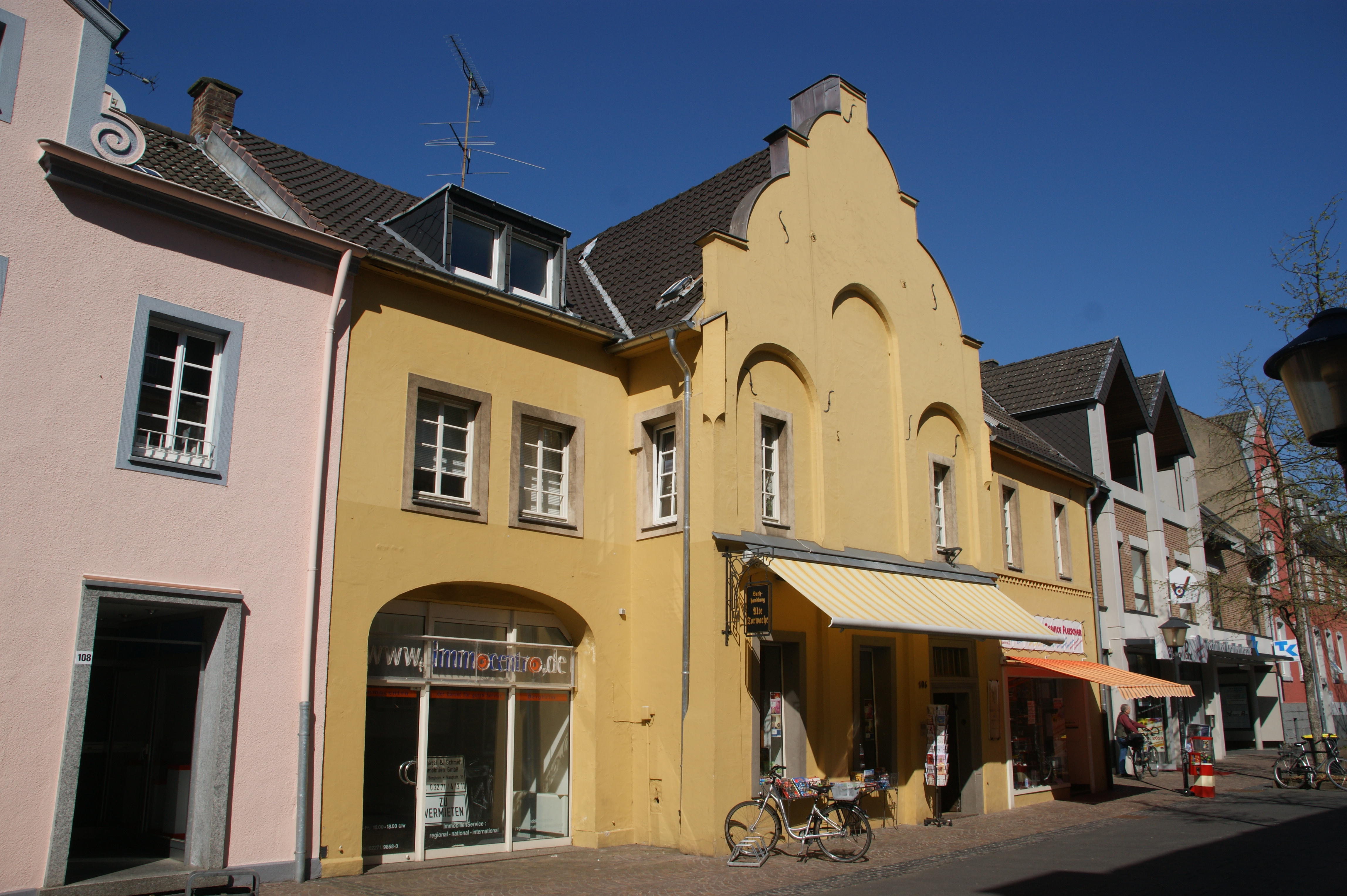 ältestes Wohnhaus in Bergheim This is a photograph of an architectural monument.